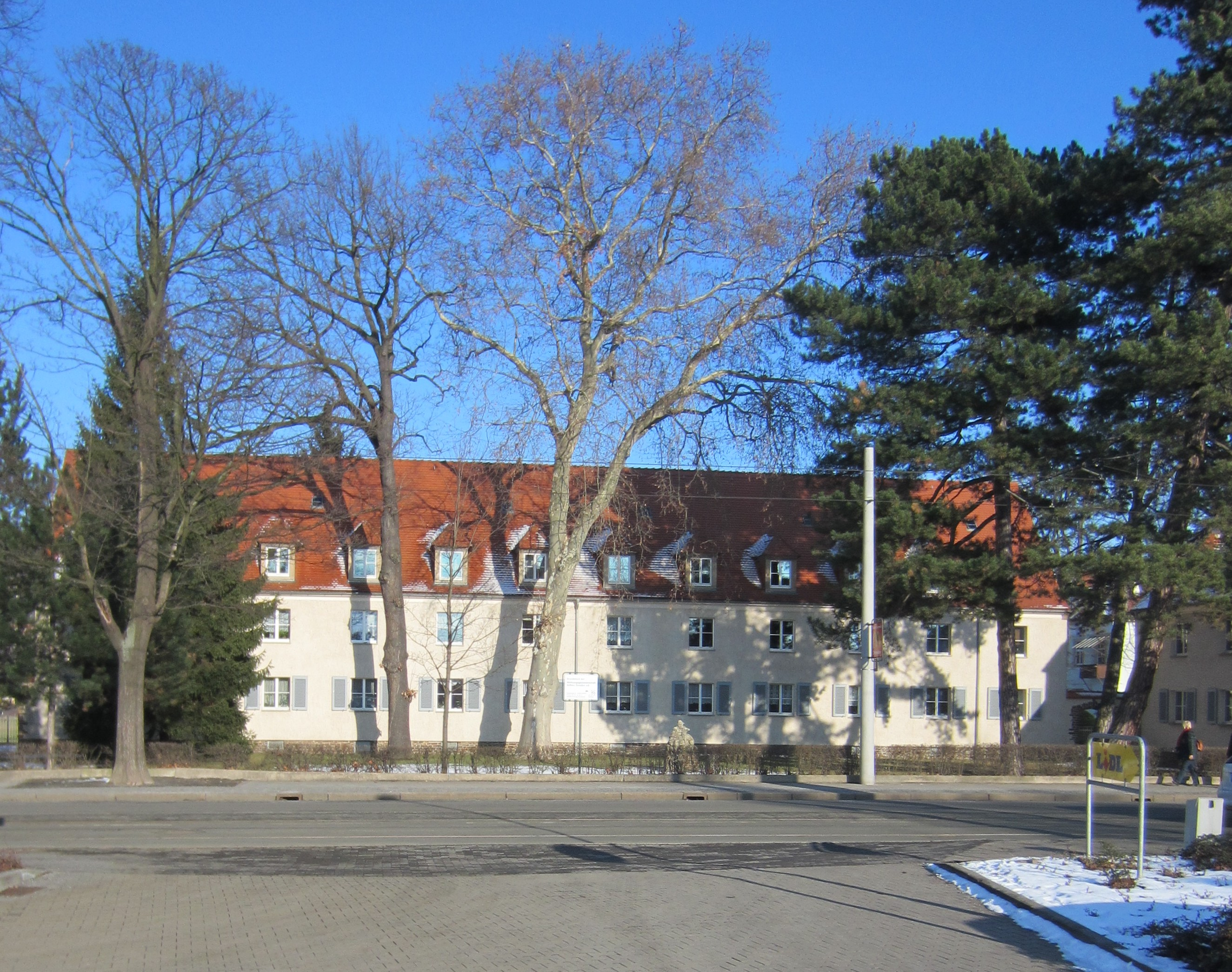 Denkmalgeschütztes Wohnhaus in Tolkewitz (Dresden), Österreicher Straße 1b-d